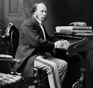 George Alexander Drew, M.P., (Wellington N.)